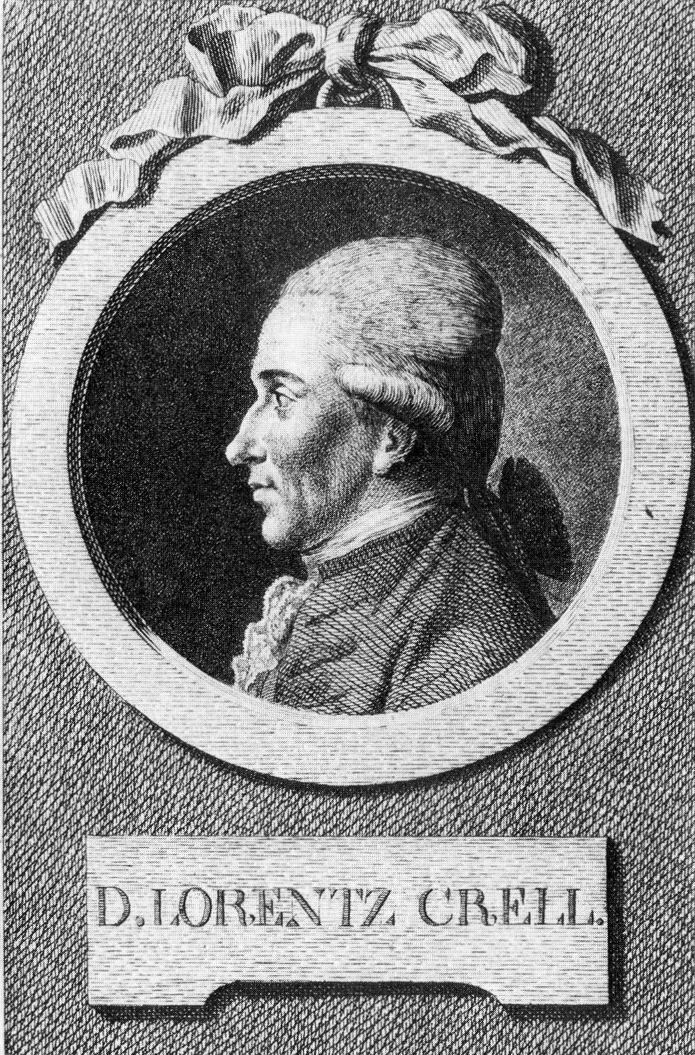 Lorenz von Crell (1744–1816), Professor an der Universität Helmstedt